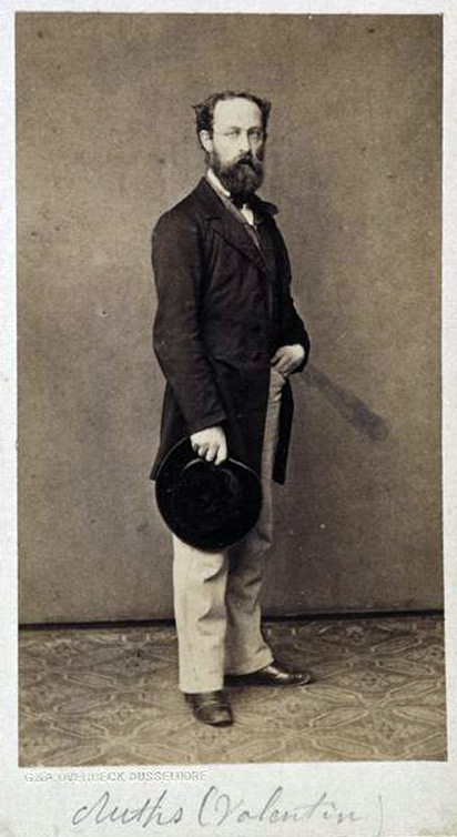 Fotografie von Valentin Ruths, Arnold Overbeck, Gebr. G. & A. Overbeck in Düsseldorf